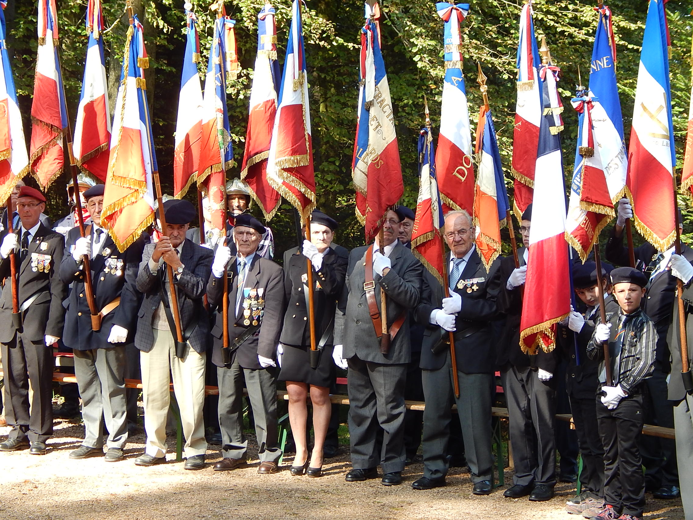 Porte-drapeaux aux Maquis du Haut du Bois